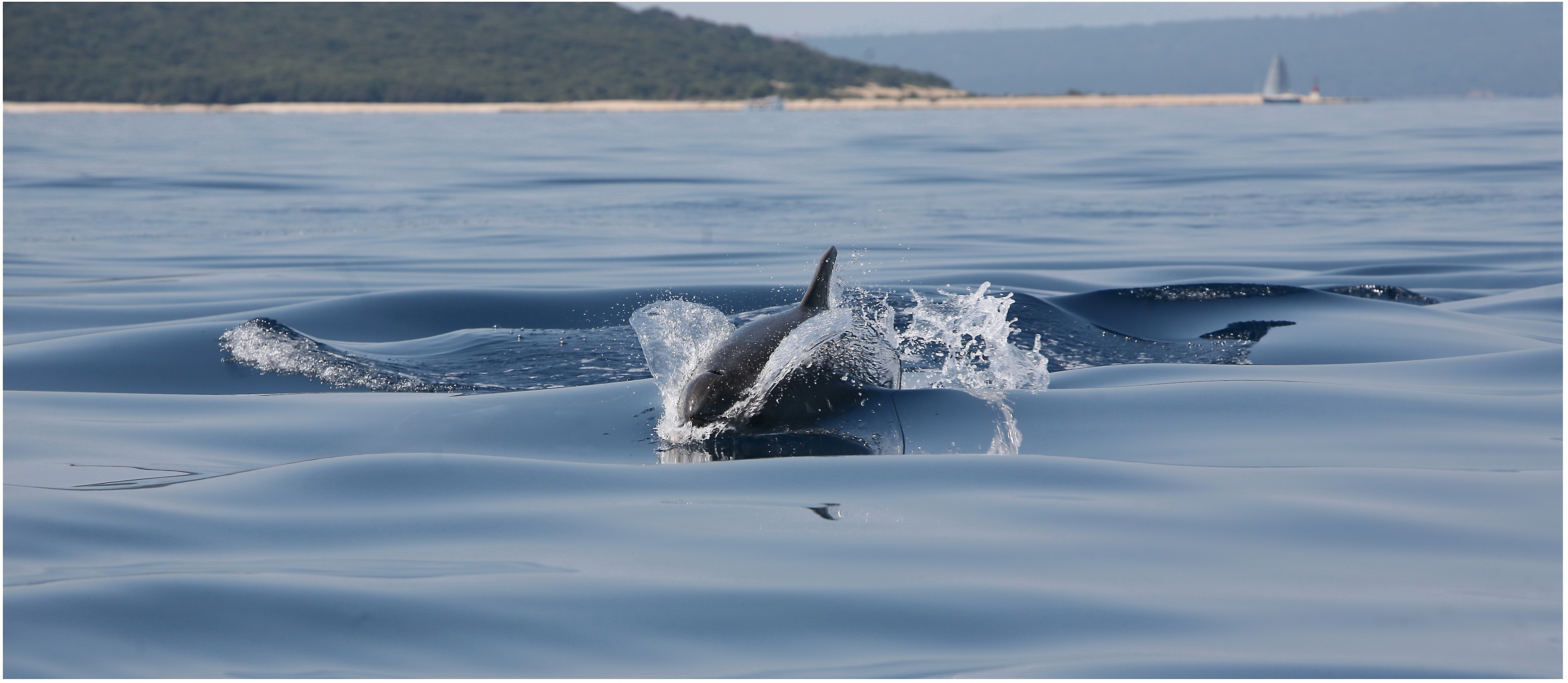 Dobri dupin 14.VII.2009. Cres-Lošinj. 2